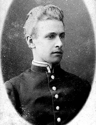 Кістяківський Ігор Олександрович, студент Київського університету Св. Володимира, без дати, (український державний діяч, 2-й Міністр внутрішніх справ Гетьманського уряду України).